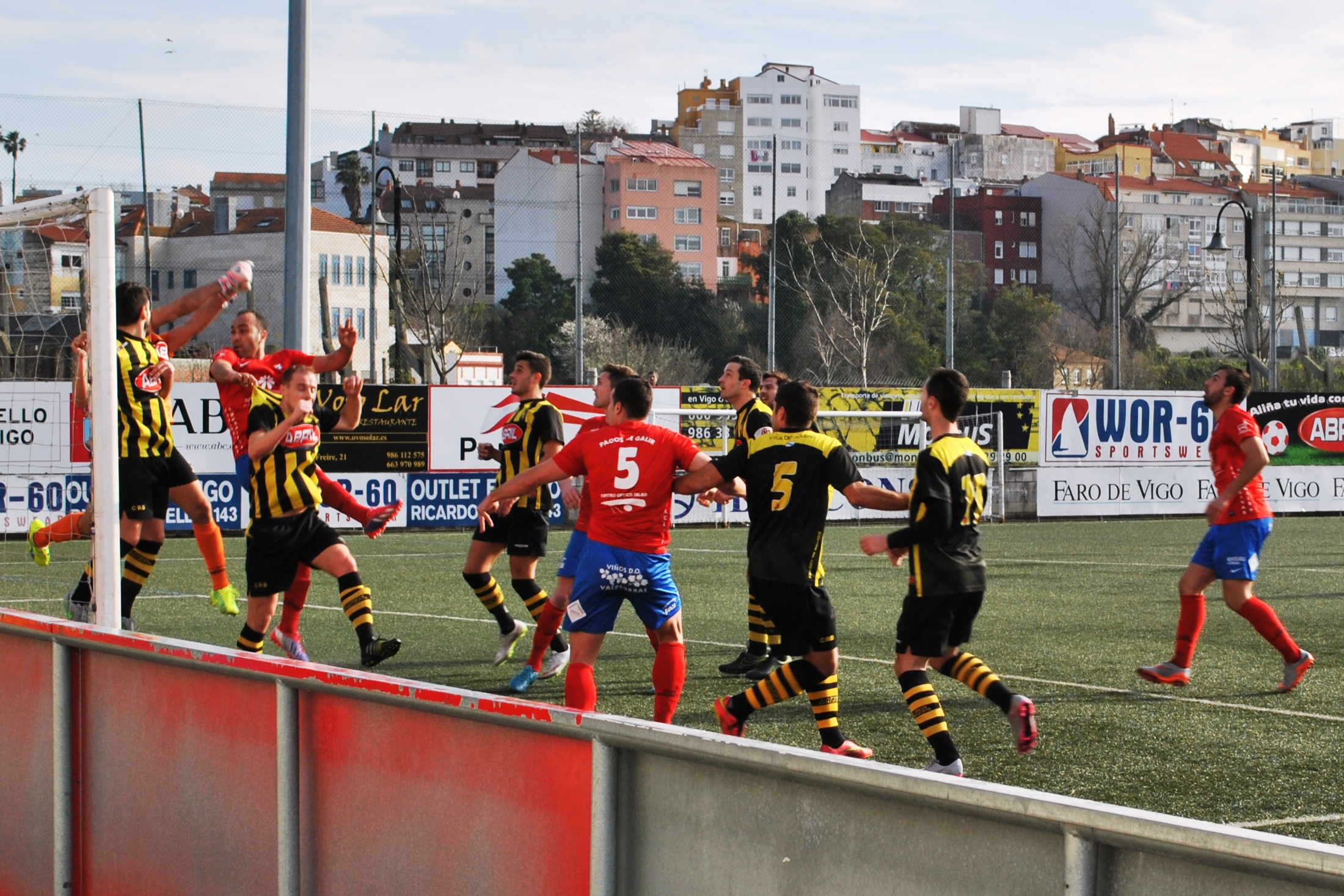 Partido do grupo 1 da 3ª División Española de fútbol entre o Rápido de Bouzas e o CD Barco no campo de fútbol municipal Baltasar Pujales. Venceu o Rápido 2-0.